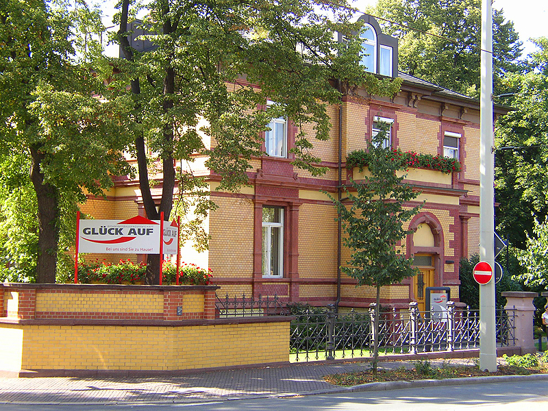 Die Geschäftsstelle der WBG "Glück Auf" befindet sich in Geras Zentrum, in der Berliner Straße 5 (ehemals Villa Sparmberg